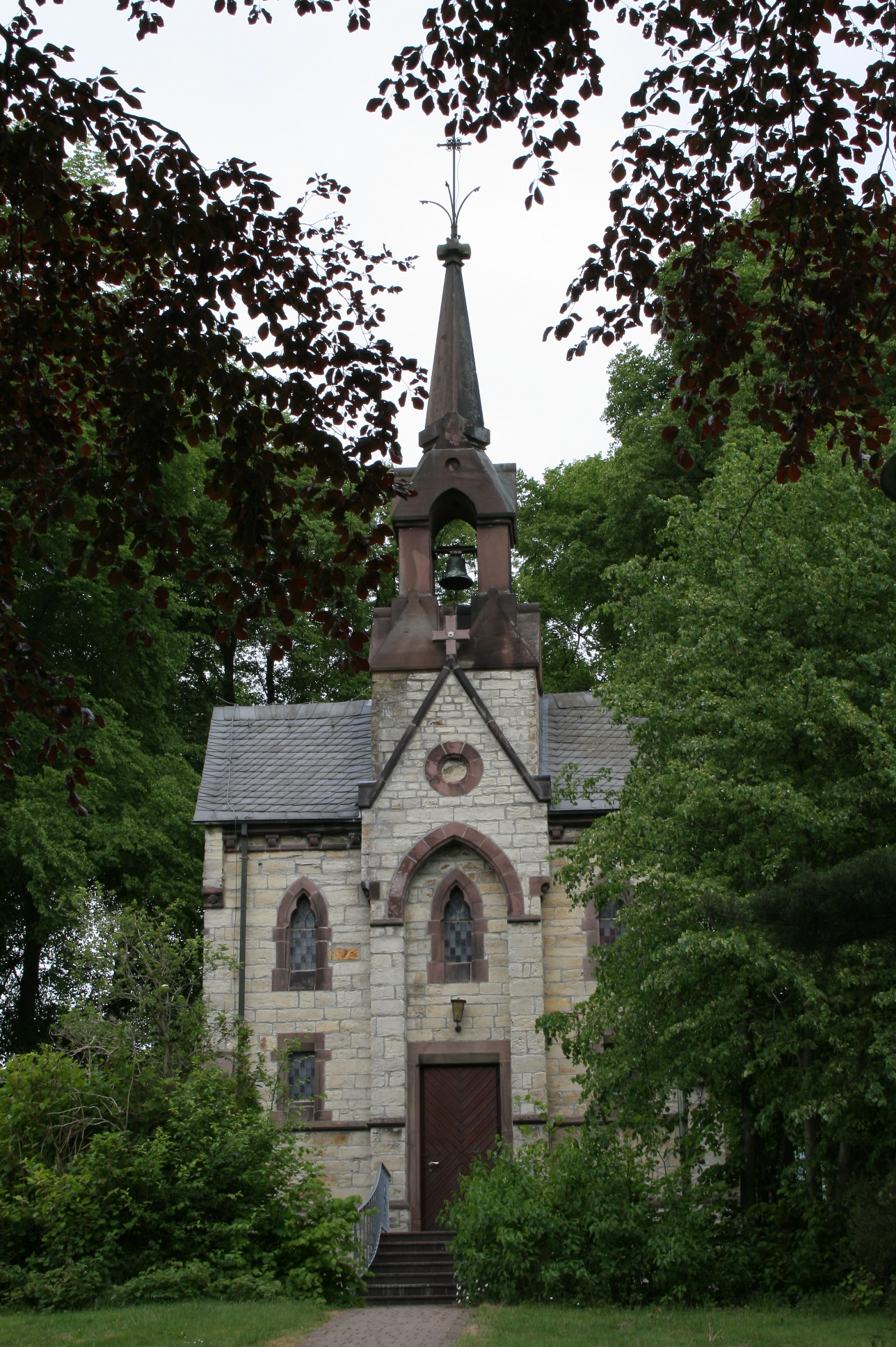 Markuskapelle im Warsteiner Ortsteil Sichtigvor.